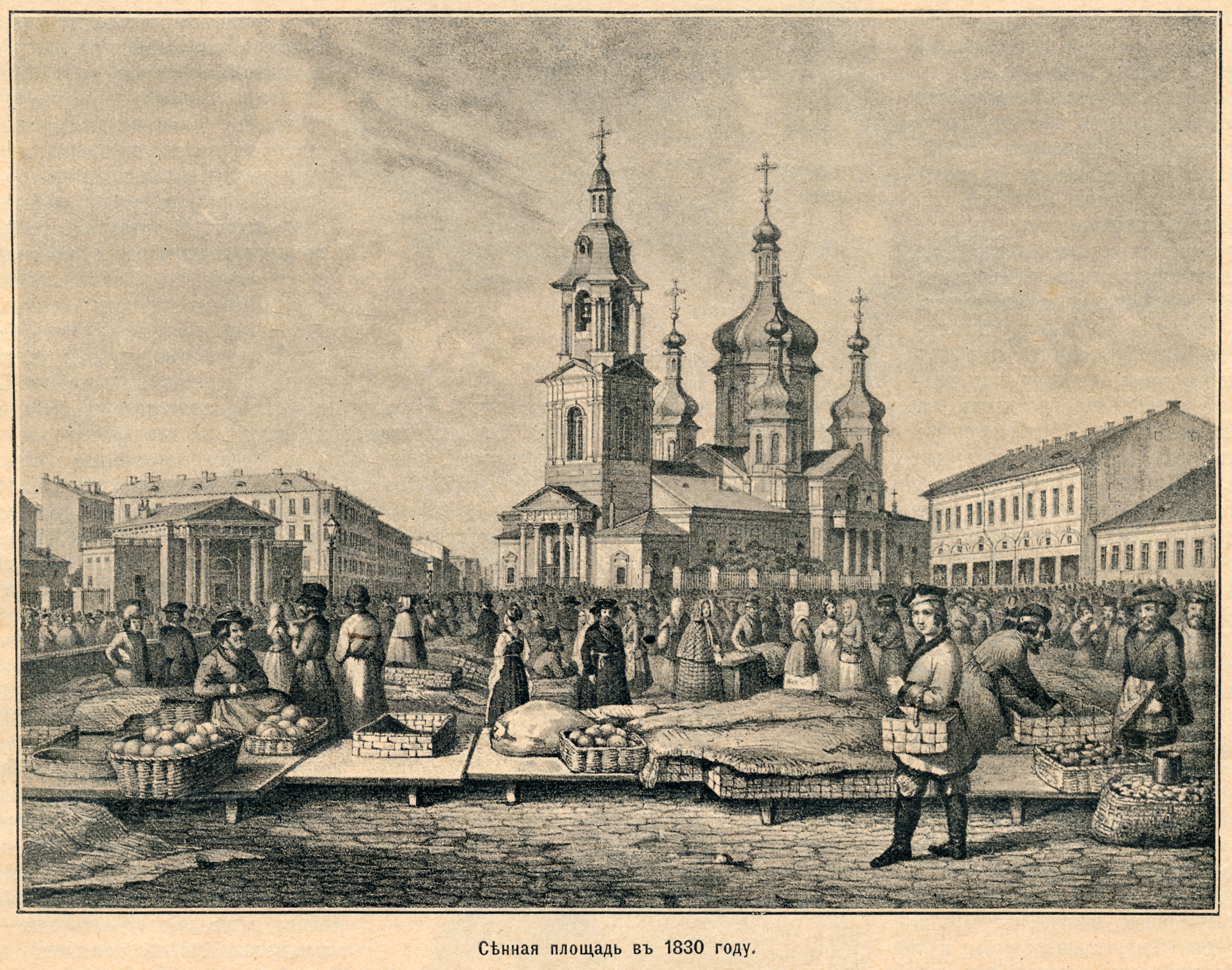 Сенная площадь в 1830 году.